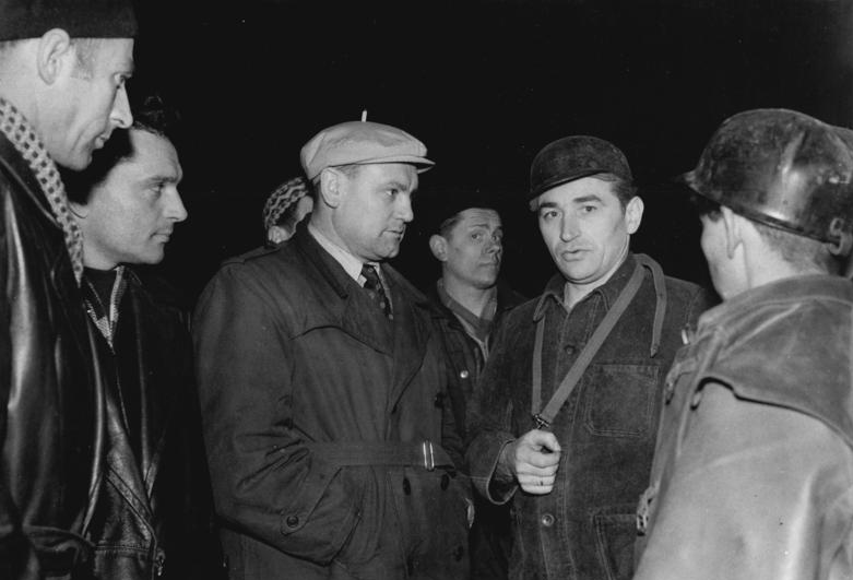 Zwickau, Rettung von Bergleuten Zentralbild Zühlsdorf 24.2.1960 Heldenmütiger Kampf in Zwickau um das Leben der eingeschlossenen Kumpel. Mit allen erdenklichen Mitteln werden die Rettungs- und Brandbekämpfungsmaßnahmen im Unglücksschacht des Steinkohlenwerkes "Karl Marx" in Zwickau, in welchem sich aus bisher noch ungeklärten Gründen am 22.2.1960 eine Grubenexplosion ereignete, fortgesetzt. Es geht um die Rettung von 106 bisher noch immer eingeschlossenen Bergleuten. UBz: Tschechoslowakische Bergleute leisten aktive Hilfe. (vlnr): Josef Nowak(CSR), Karel Beran (CSR), Josef Lukaczek(CSR), Fritz Dörr, Willi Heidel und Karl Döhler im Gespräch, nachdem die tschechoslowakischen Kumpel mehrere Fässer Latex gebracht haben.